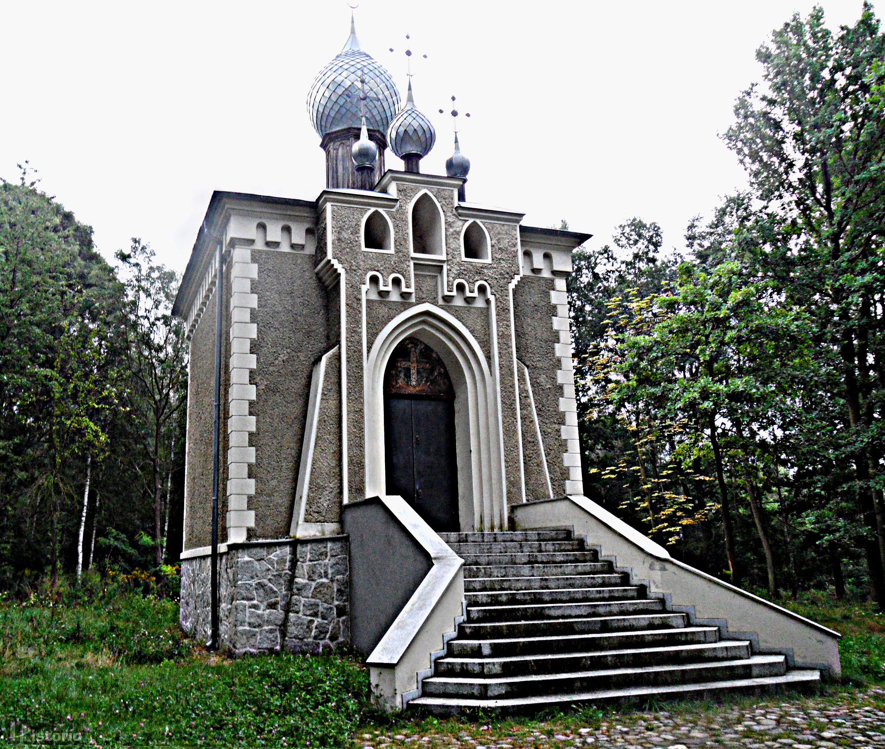 Chróścin, Cerkiew św. Jerzego Zwycięzcy w Chróścinie Wikidata has entry Q9187685 with data related to this item.